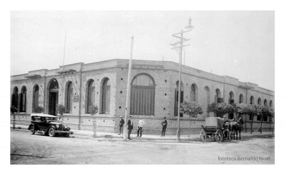 Casa de Gobierno de La Pampa (Período 1916 – 1963 aproximadamente). Colección Juan Maqueira (1930 – 1950).